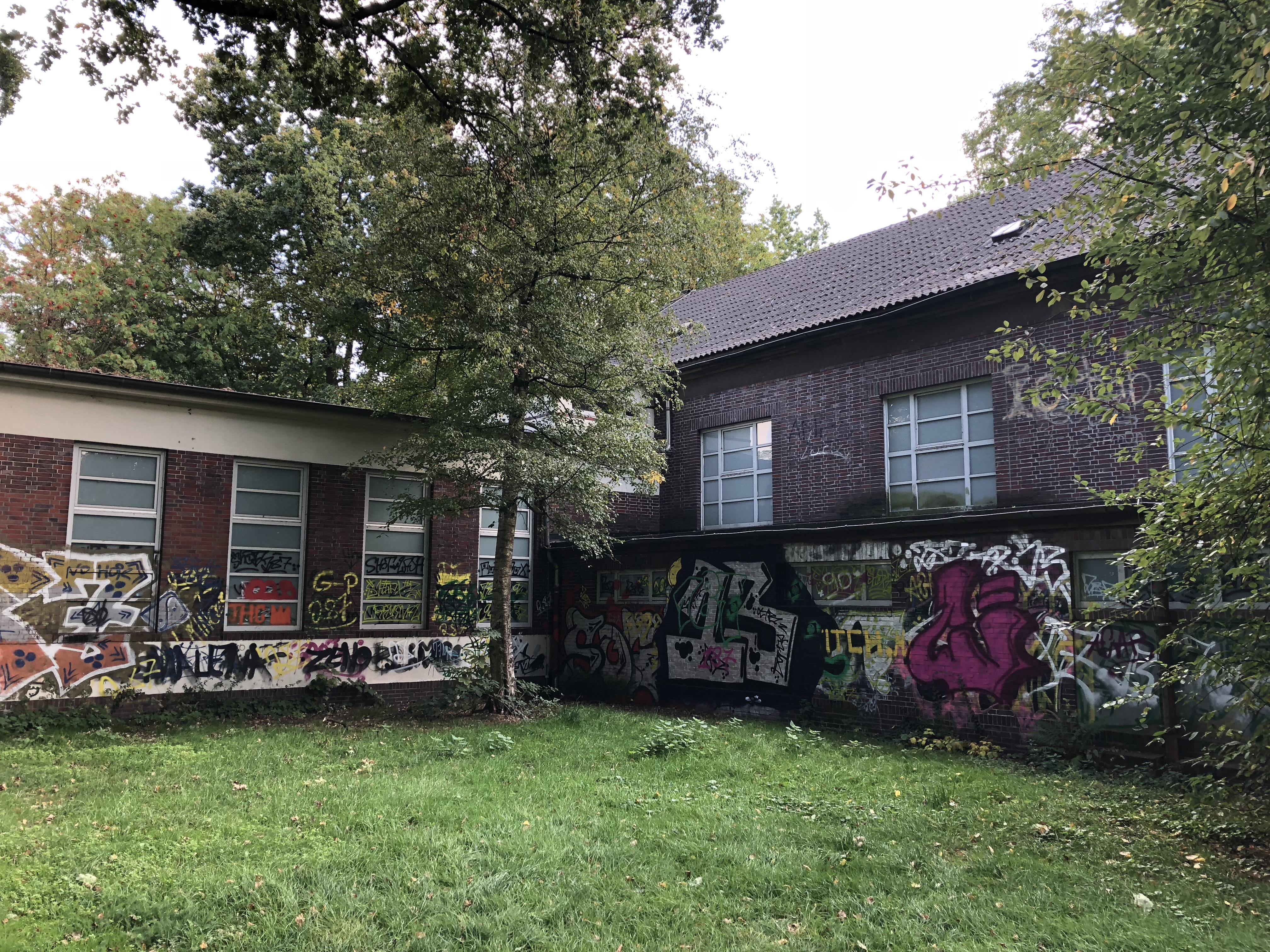 Turnhalle in Bremen, Ludwig-Jahn-Straße 6Das abgebildete Objekt ist ein geschütztes Kulturdenkmal in der Freien Hansestadt Bremen, mit der Nr. 2207 beim Landesamt für Denkmalpflege registriert.